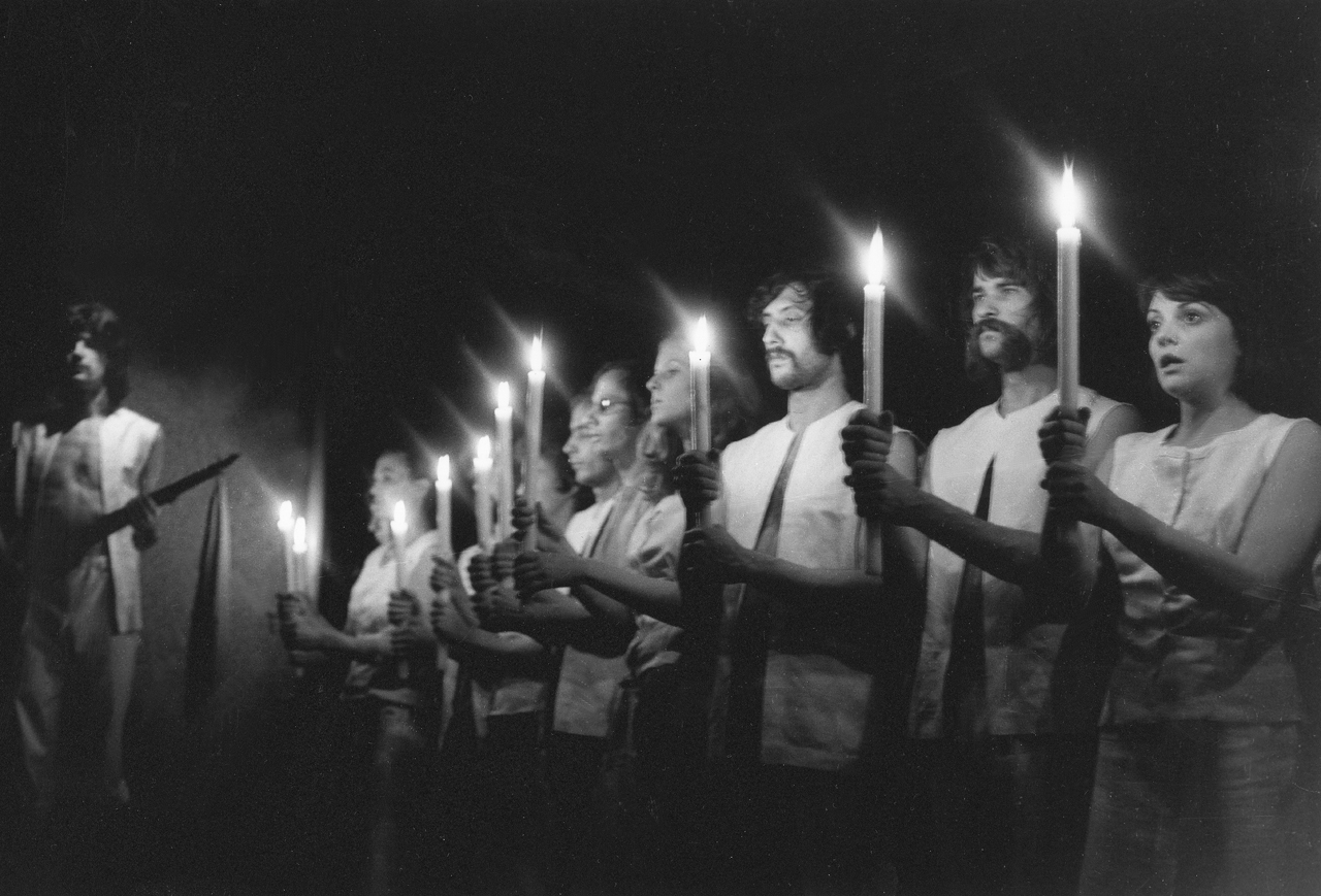 „A fegyverátvétel szertartás”-jelenet a Vörös zsoltár című előadásból (bal szélen Pelsőczy László, a sorban balról jobbra: Bajcsay Mária (kissé belógva), mellette egy nem azonosítót stúdiós, Jeney István (csillanó szemüvegben), Tóth Éva, Tardy Balázs, Nagy Zoltán és Jobba Gabi. Rendező: Jancsó Miklós (a filmje alapján) (Helyszín: Budapest, 25. Színház)